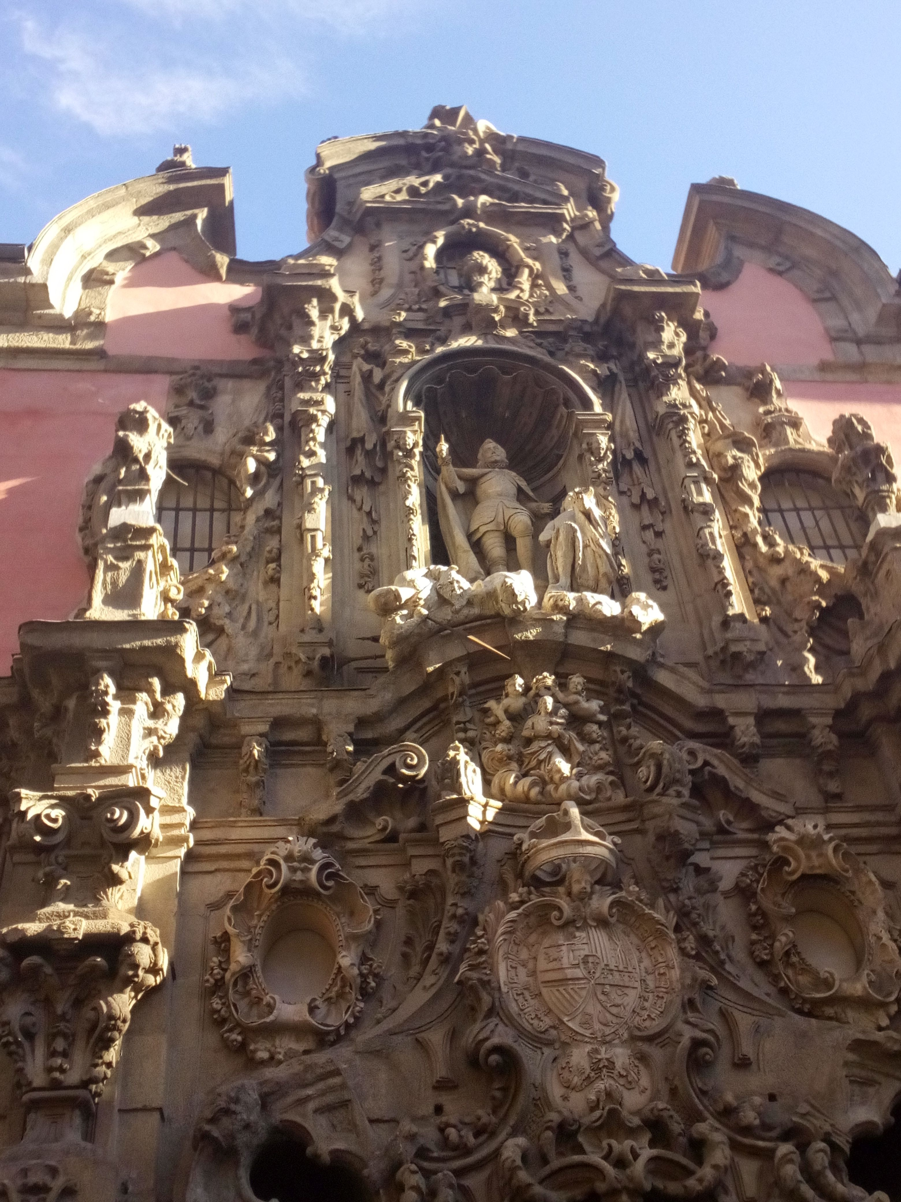 Cxurigera detalo de la baroka fasado de la Muzeo de Historio de Madrido